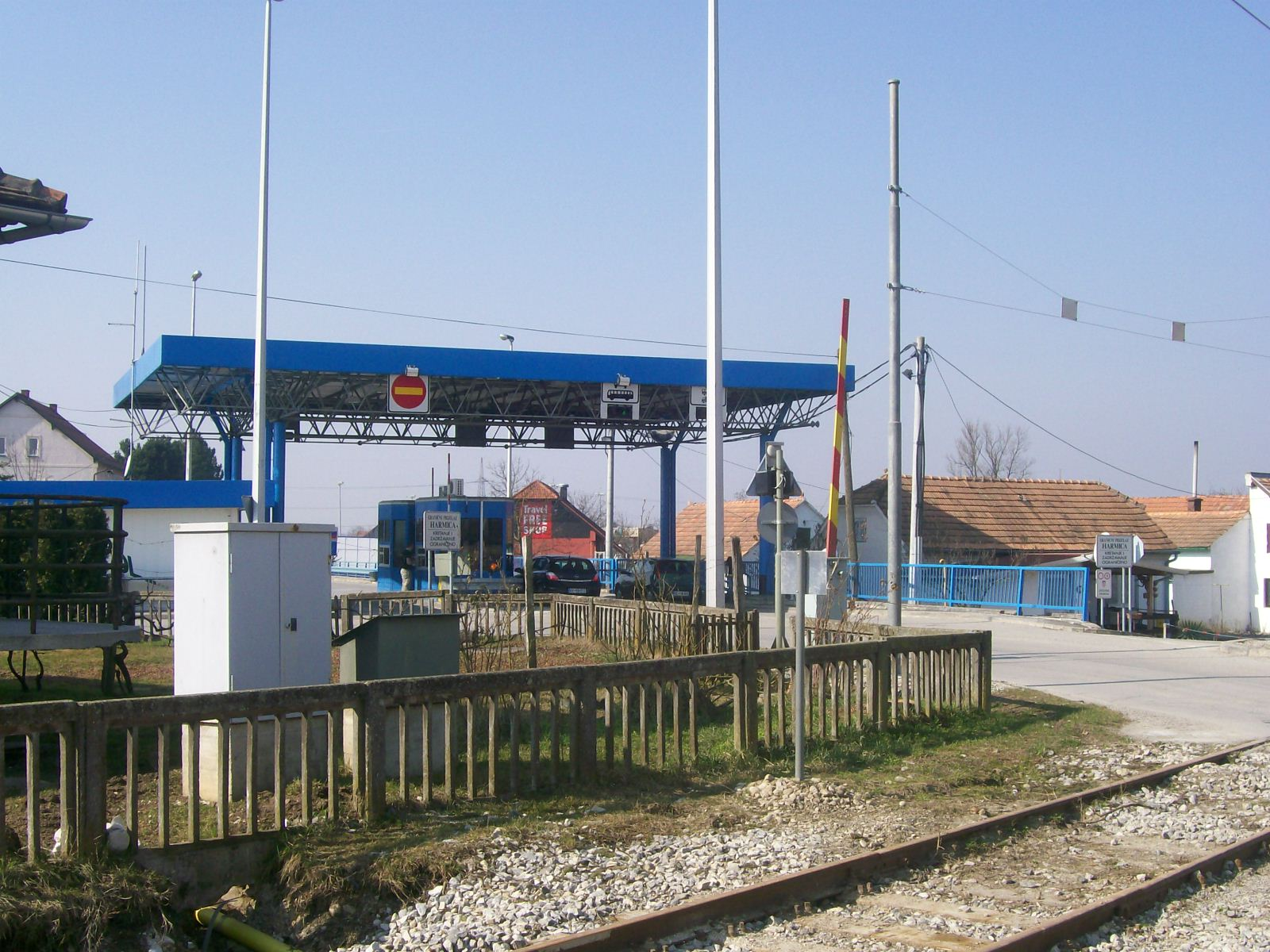 Granični prijelaz Harmica (HR)-Dobova (SLO)